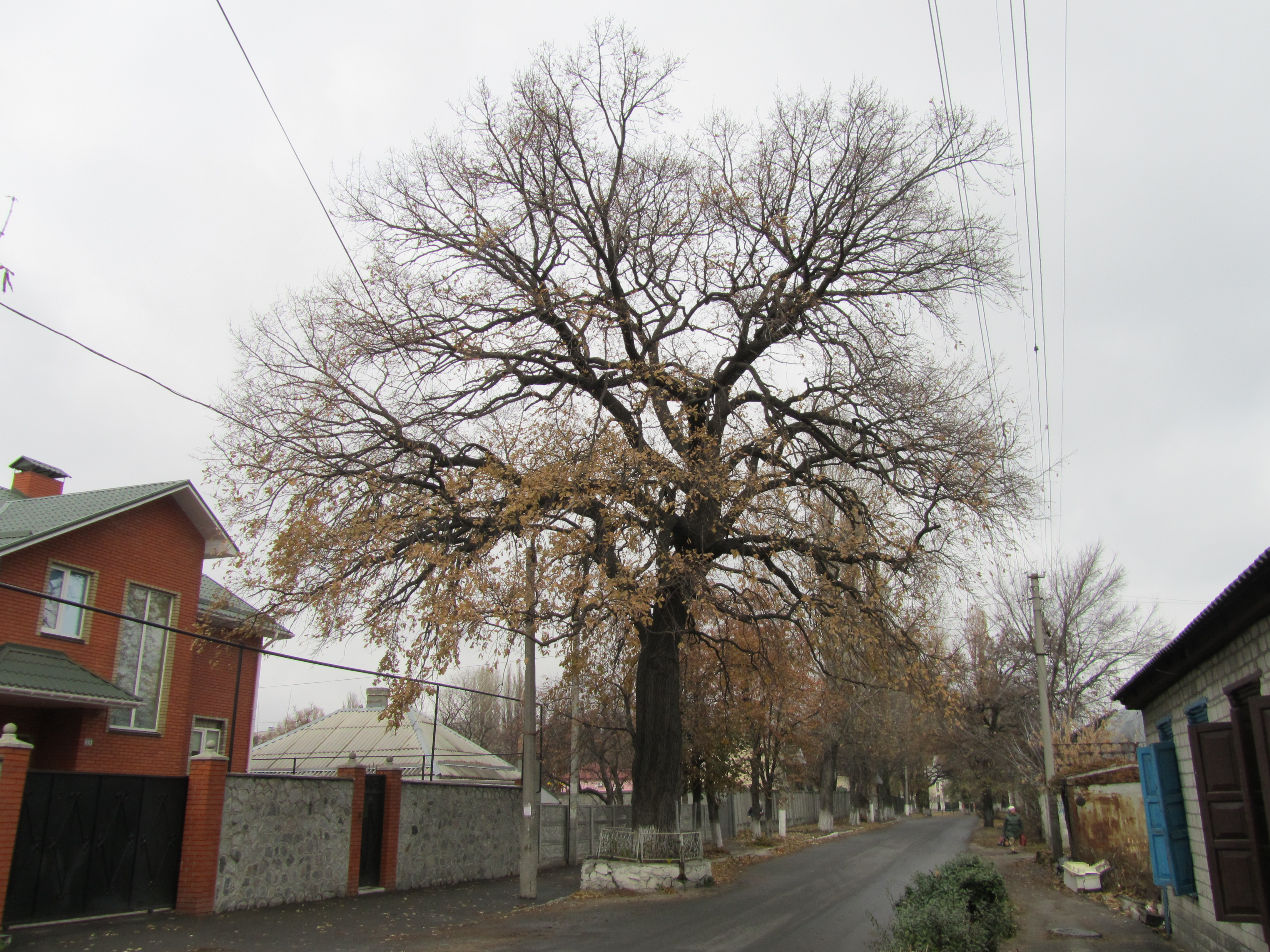 Старий дубом у Кременчуці, висаджений при приїзді до міста Катерини II